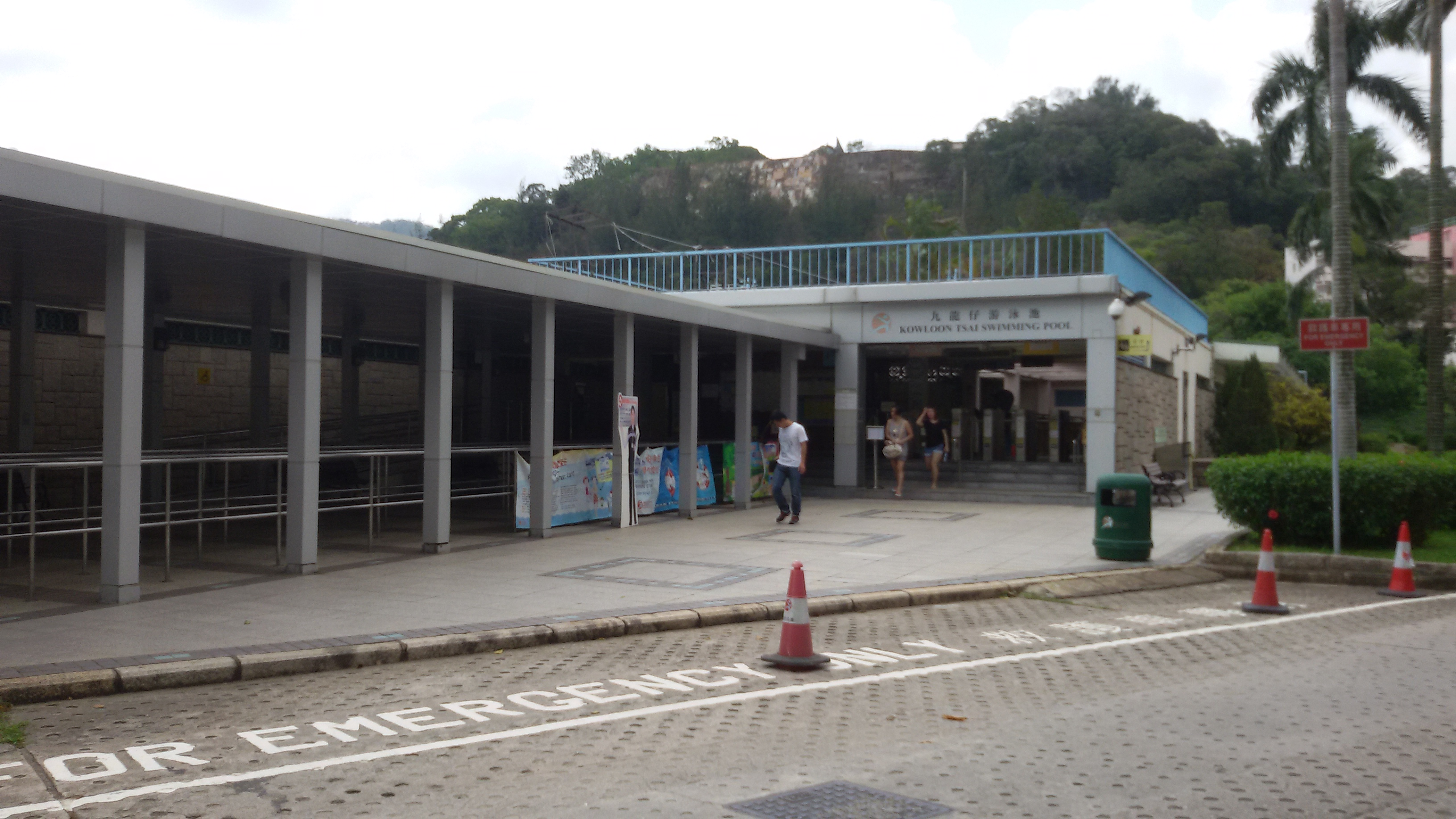 粵語: 九龍仔游泳池